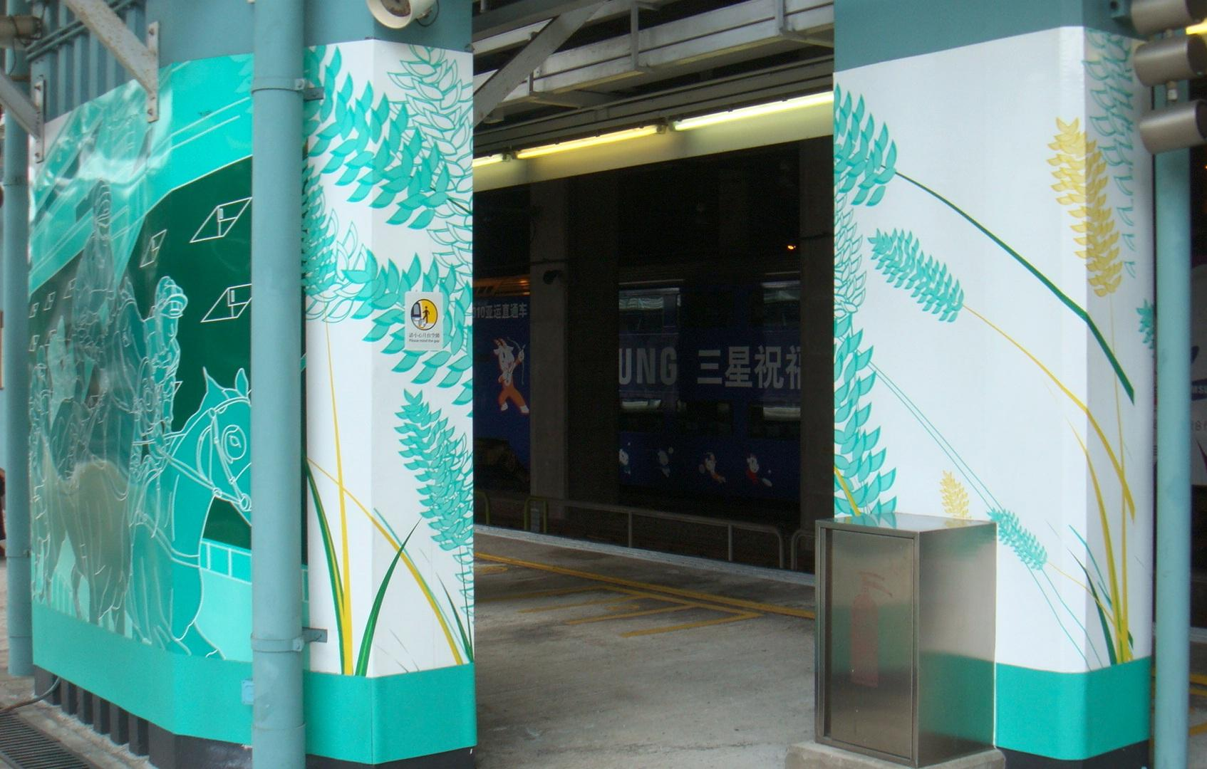 馬場站東鐵線 1